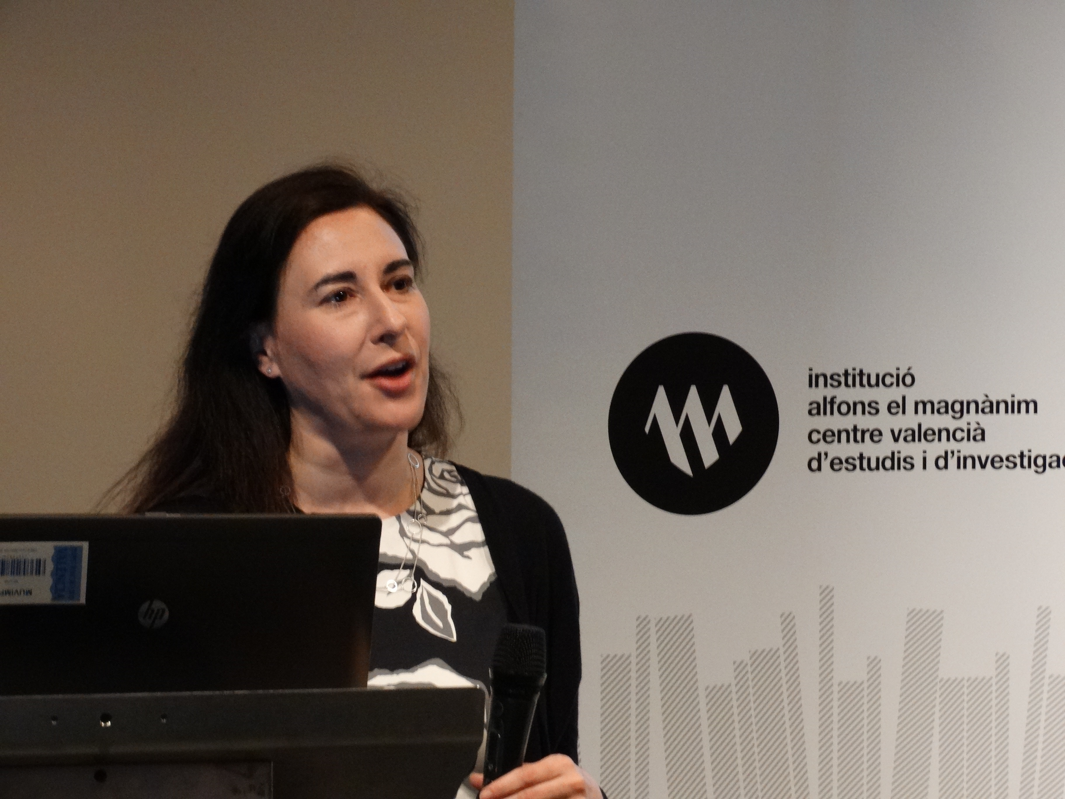 Sharon Weinberger al Magnànim